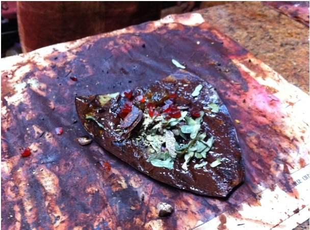 Photo de paan